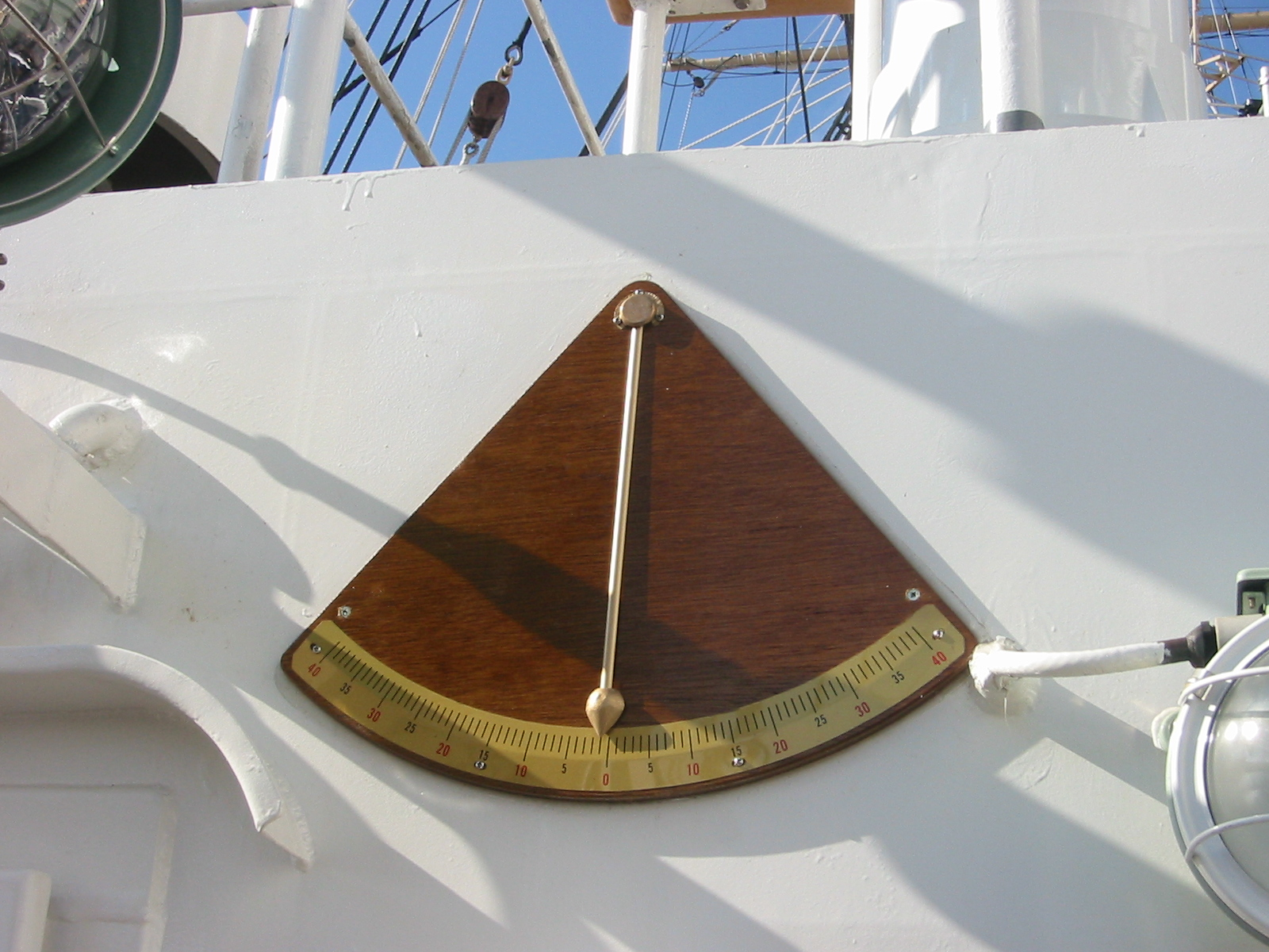 クリノメーター海王丸II世 メリケンパーク中突堤にて